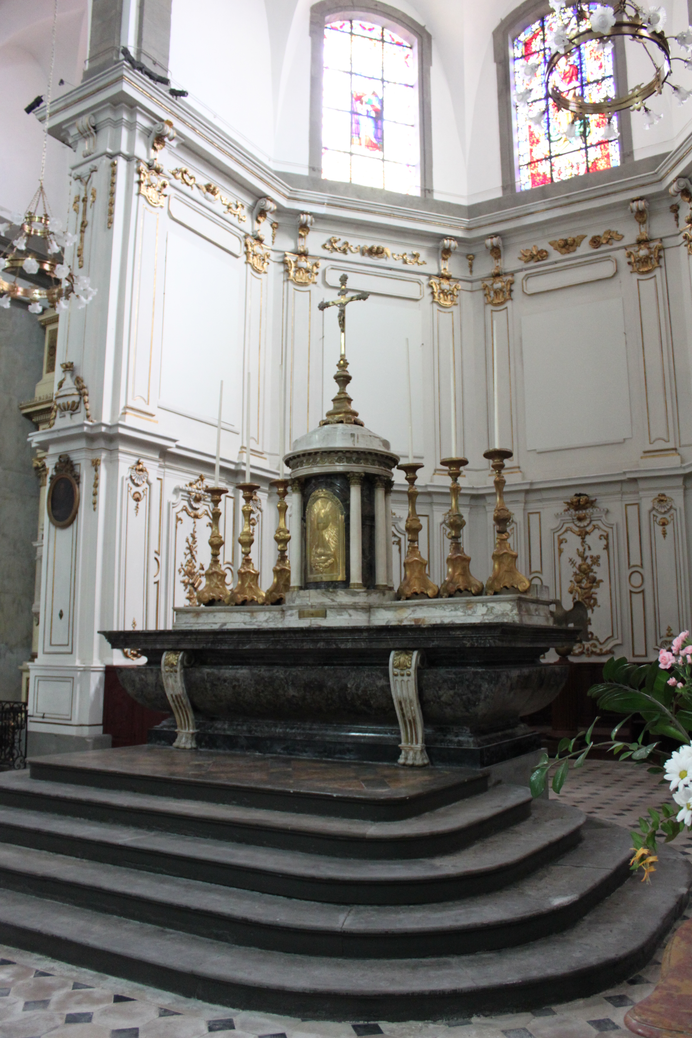 Église Saint-Georges, Vesoul, Haute-Saône, Franche-Comté, France